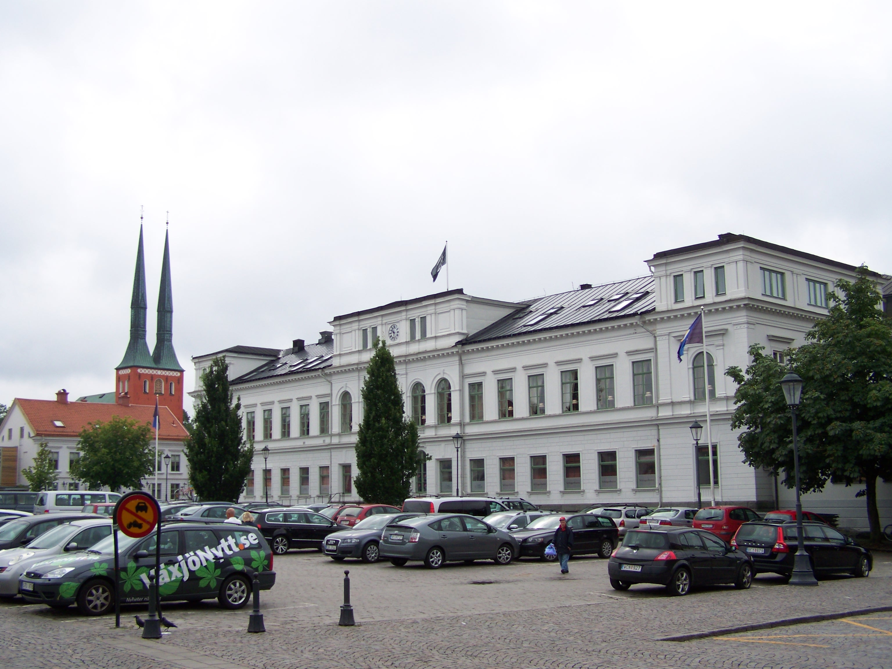 In Schweden. Växjö, Markt